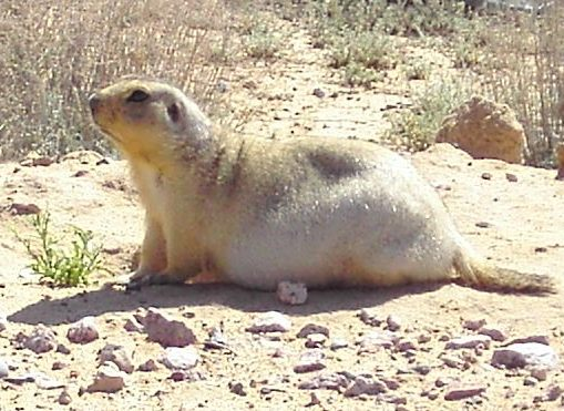 Суслик жёлтый (Spermophilus fulvus). Кызылординская область Казахстана.